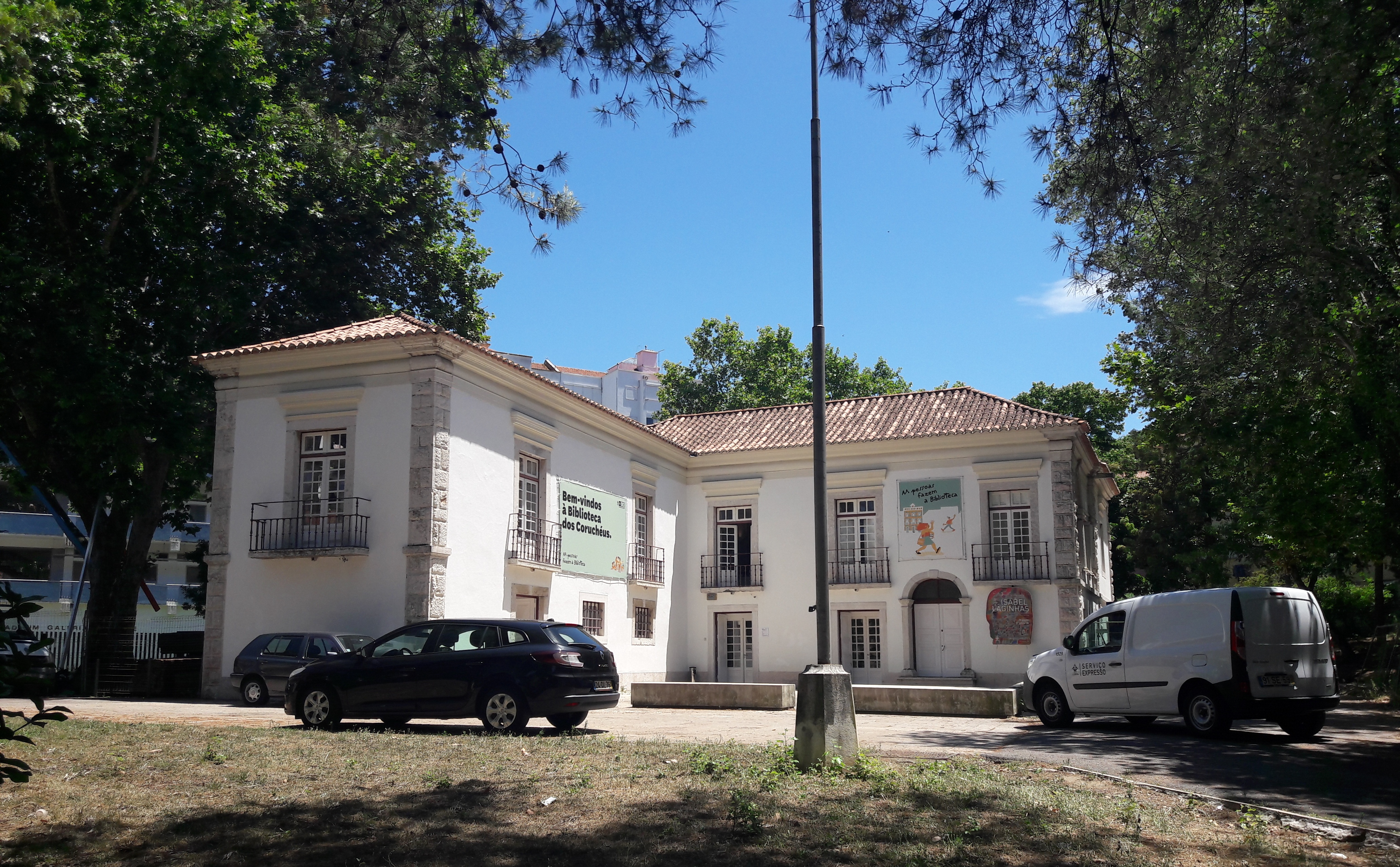 Biblioteca dos Coruchéus, em Alvalade, Lisboa.